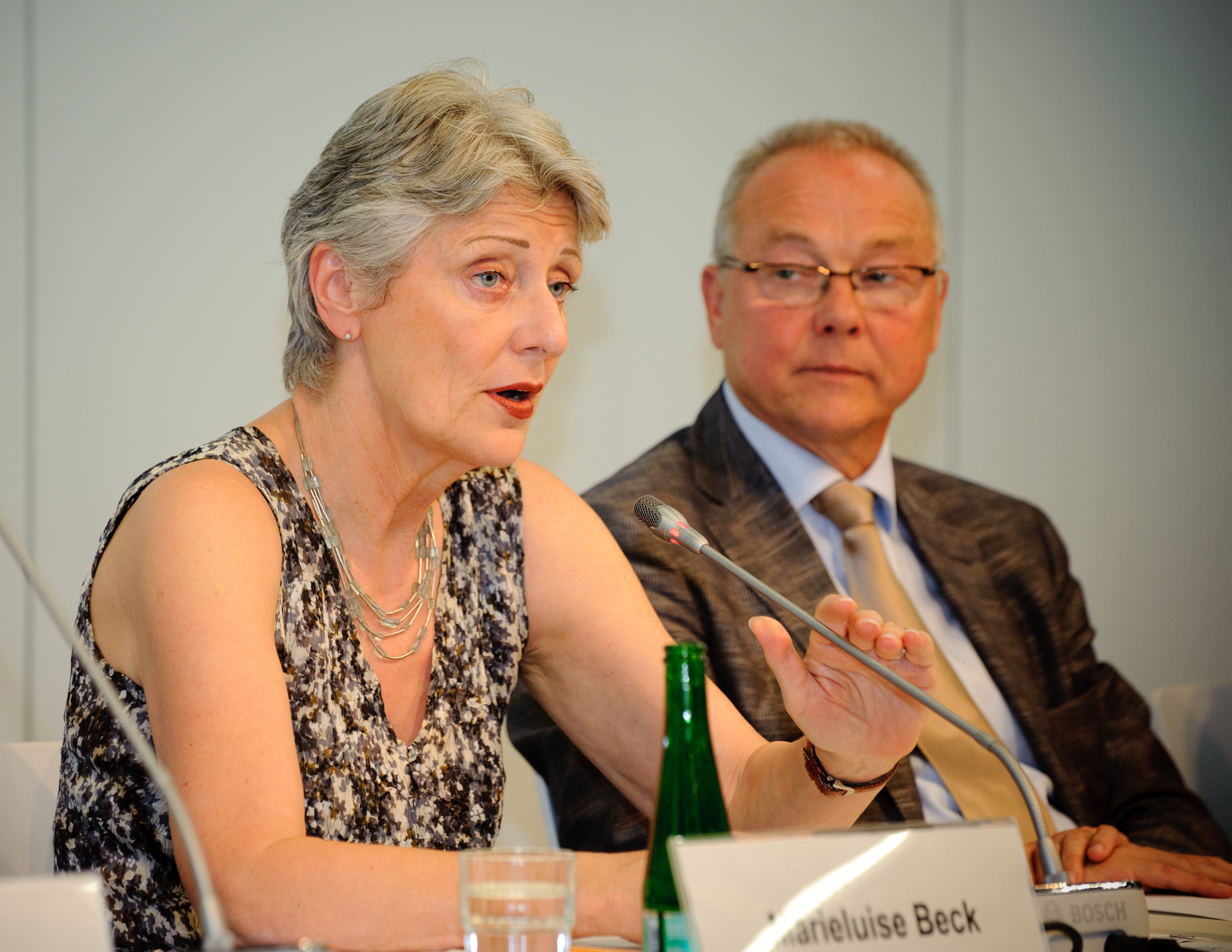 Dieses Foto entstand auf der Podiumsdiskussion "Die UNO und der Völkermord von Srebrenica" am 5. Juli 2010 in der Heinrich-Böll-Stiftung in Berlin. Foto: Stephan Röhl